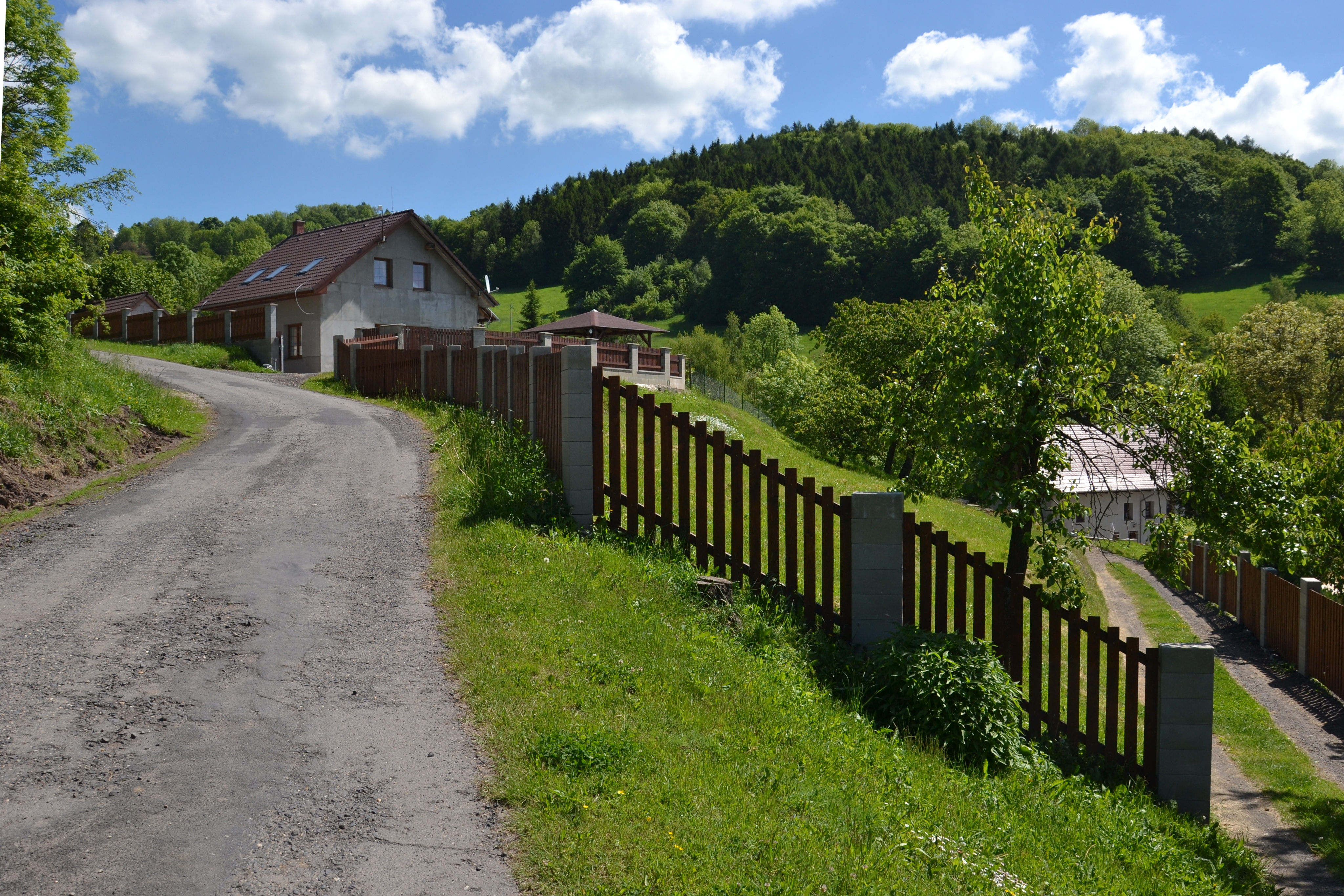 Babiny II – příjezdová cesta do osady